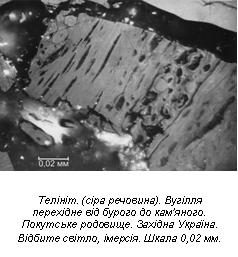 Телініт